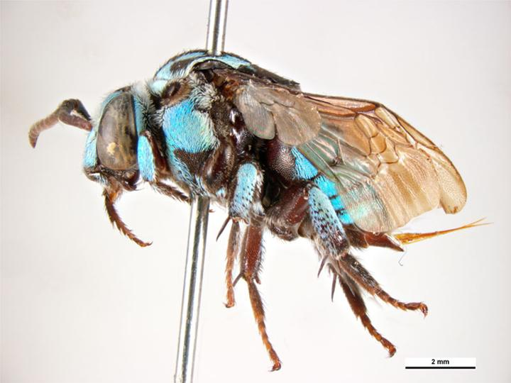 Thyreus nitidulus female